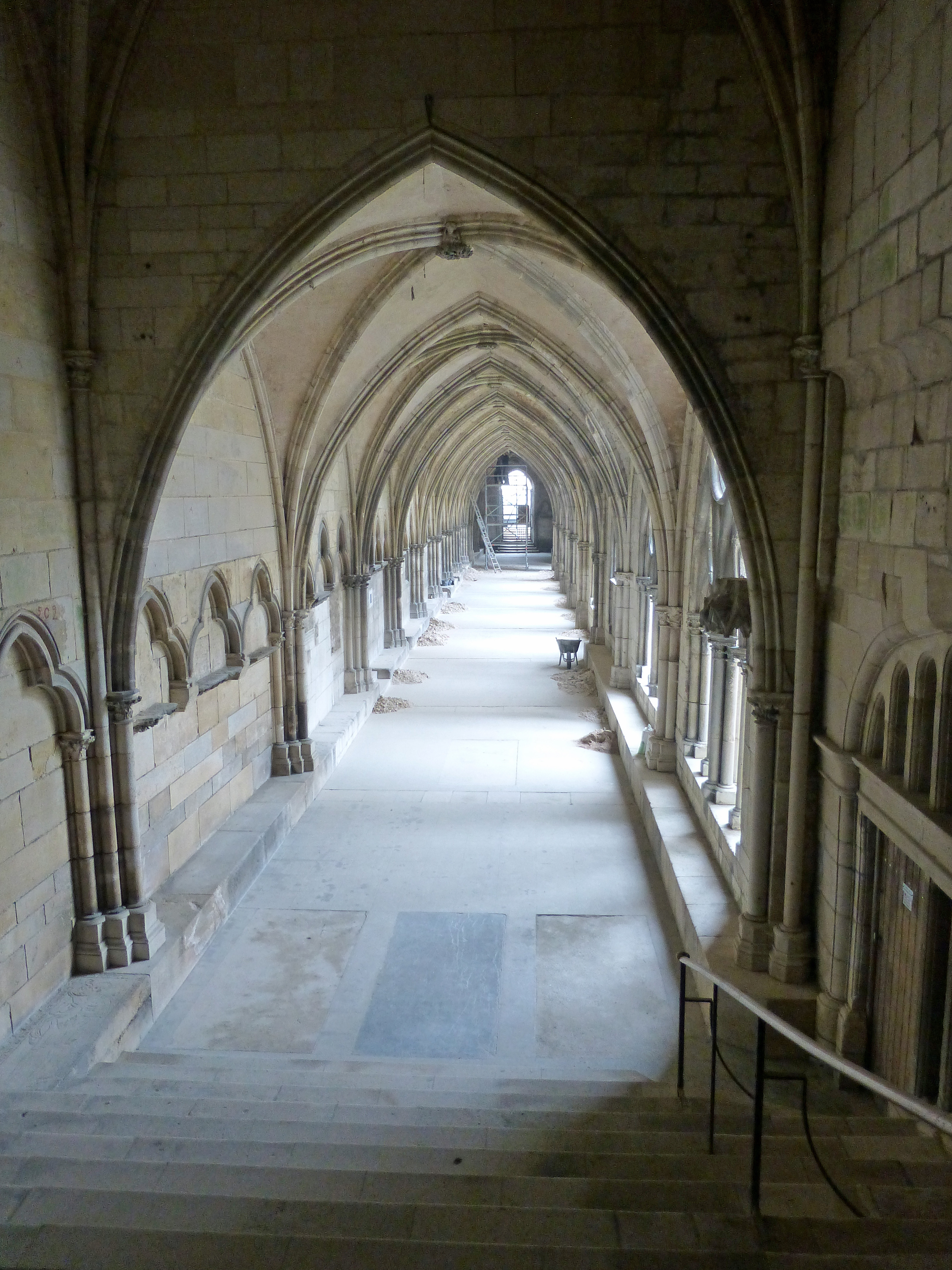 Cathédrale Saint-Etienne de Toul (Meurthe-et-Moselle) : cloître en cours de restauration (2013)